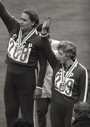 Tamara Press and Galina Zybina (right), Tokyo, 1964